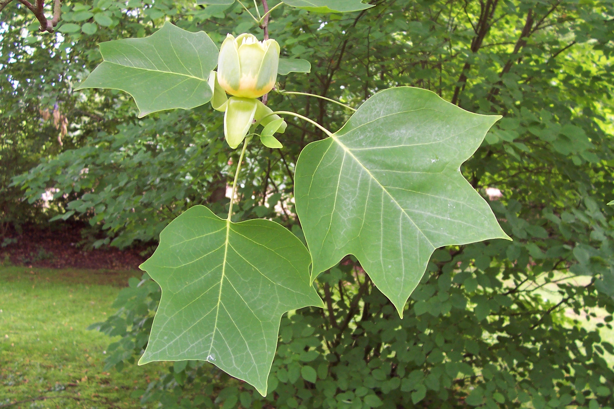 Liriodendron tulipifera at Hamburg-Harburg city park